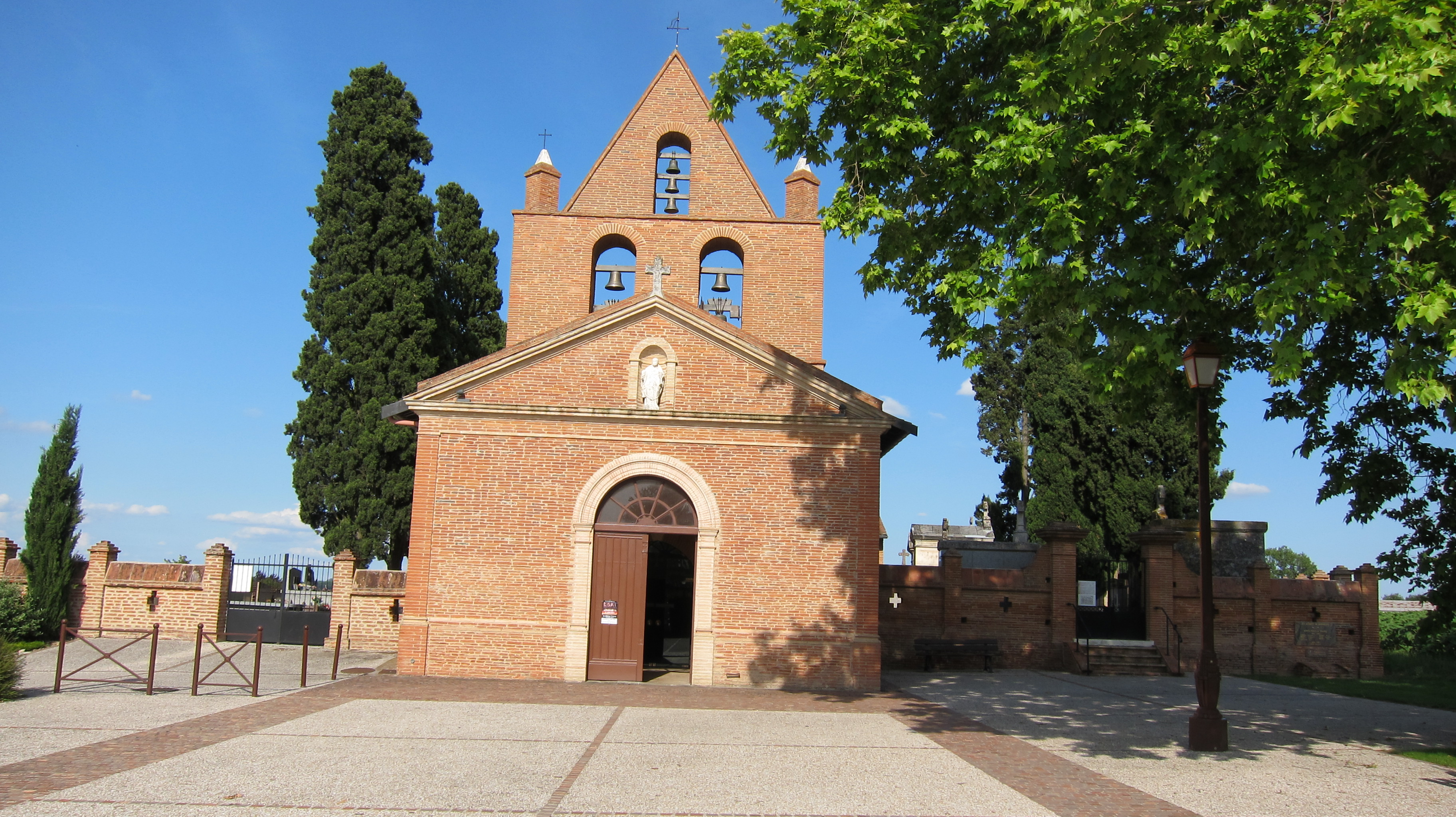 Mondouzil (Haute-Garonne, Midi-Pyrénées, France) : L'église Saint-Martial.